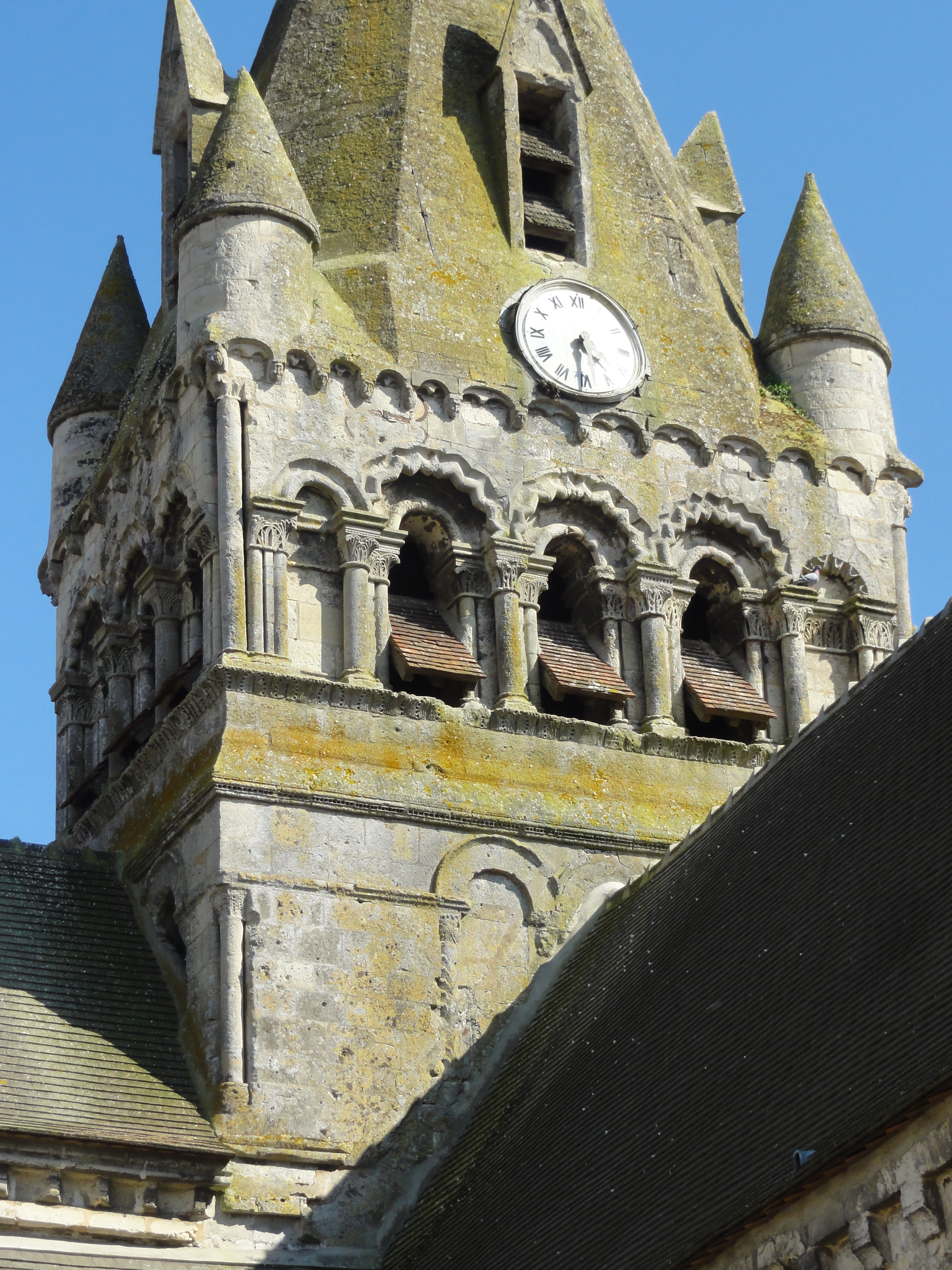 Clocher, vue depuis l'ouest.